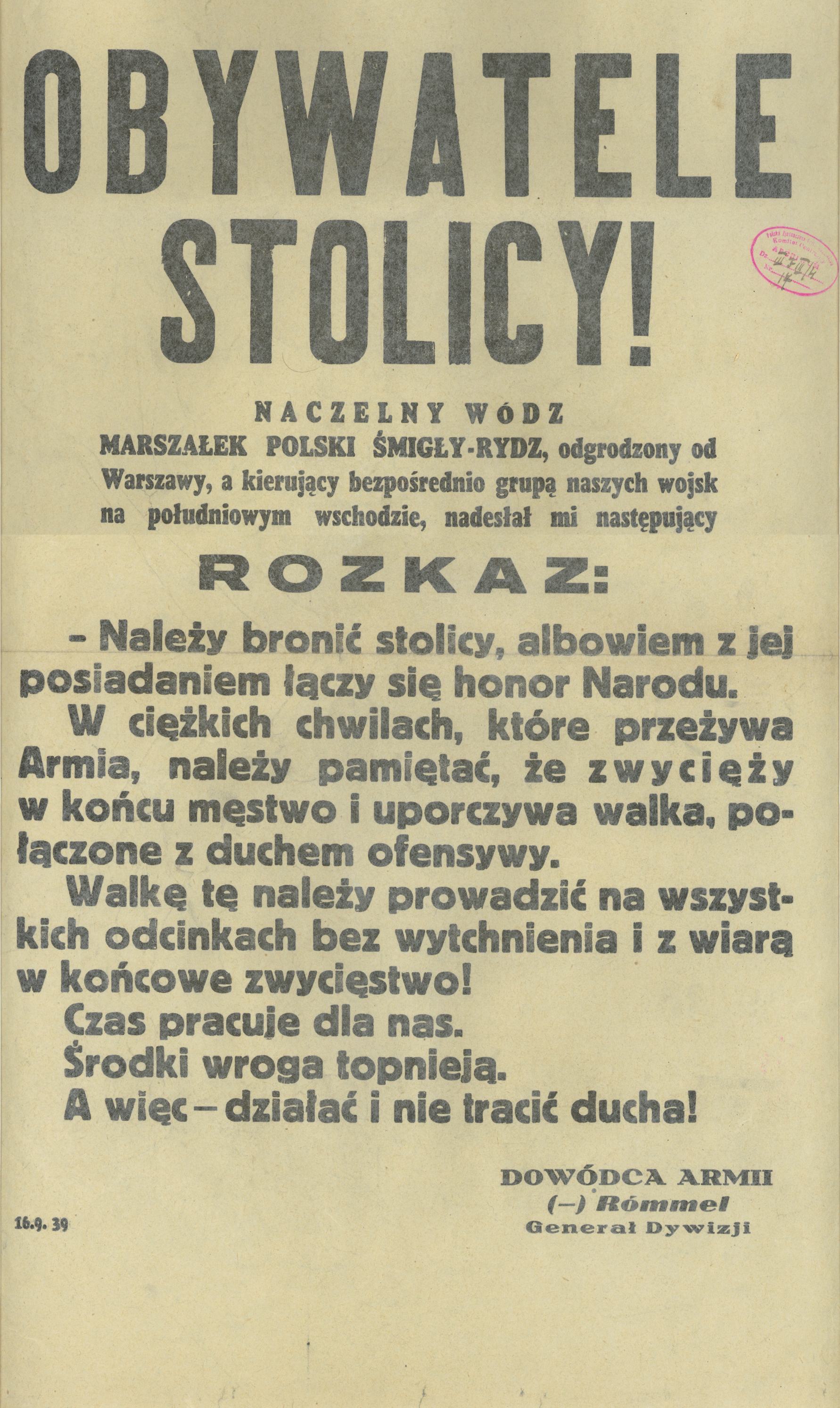 Rozkaz Śmigłęgo-Rydza w postaci odezwy do mieszkańców Warszawy